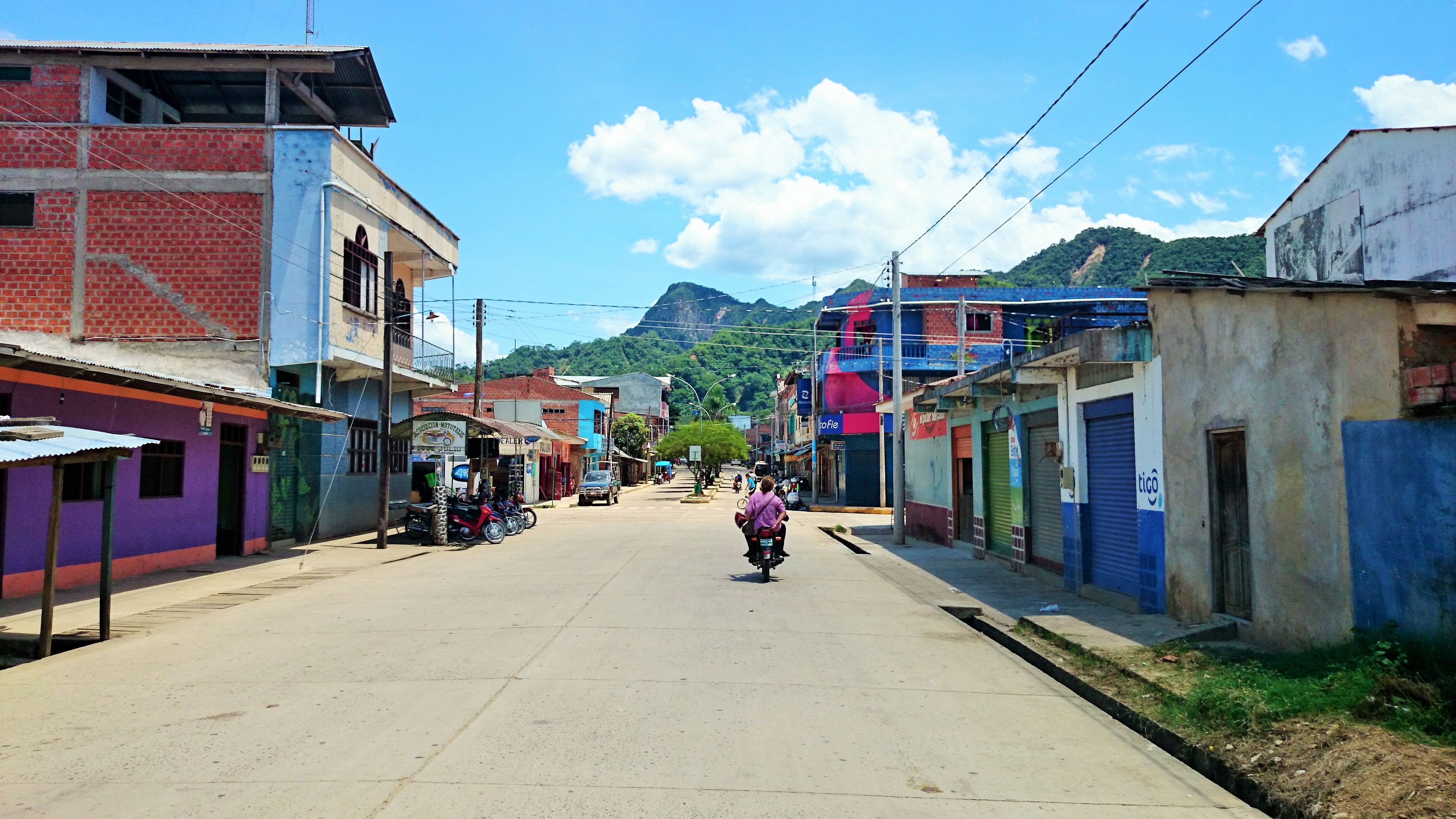 Rurrenabaque Calle Aniceto Arce